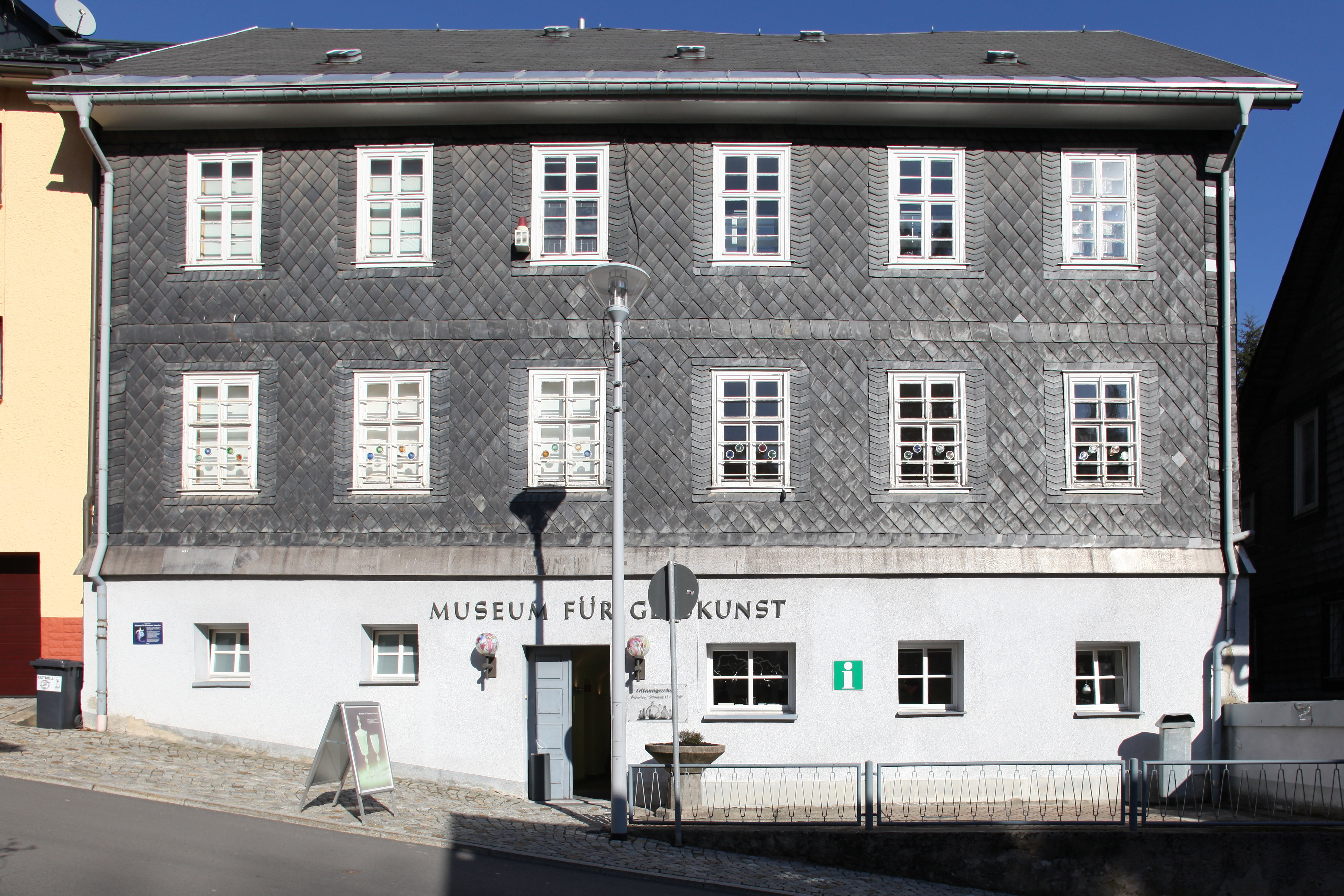 Museum für Glaskunst, Lauscha, Oberlandstraße 10